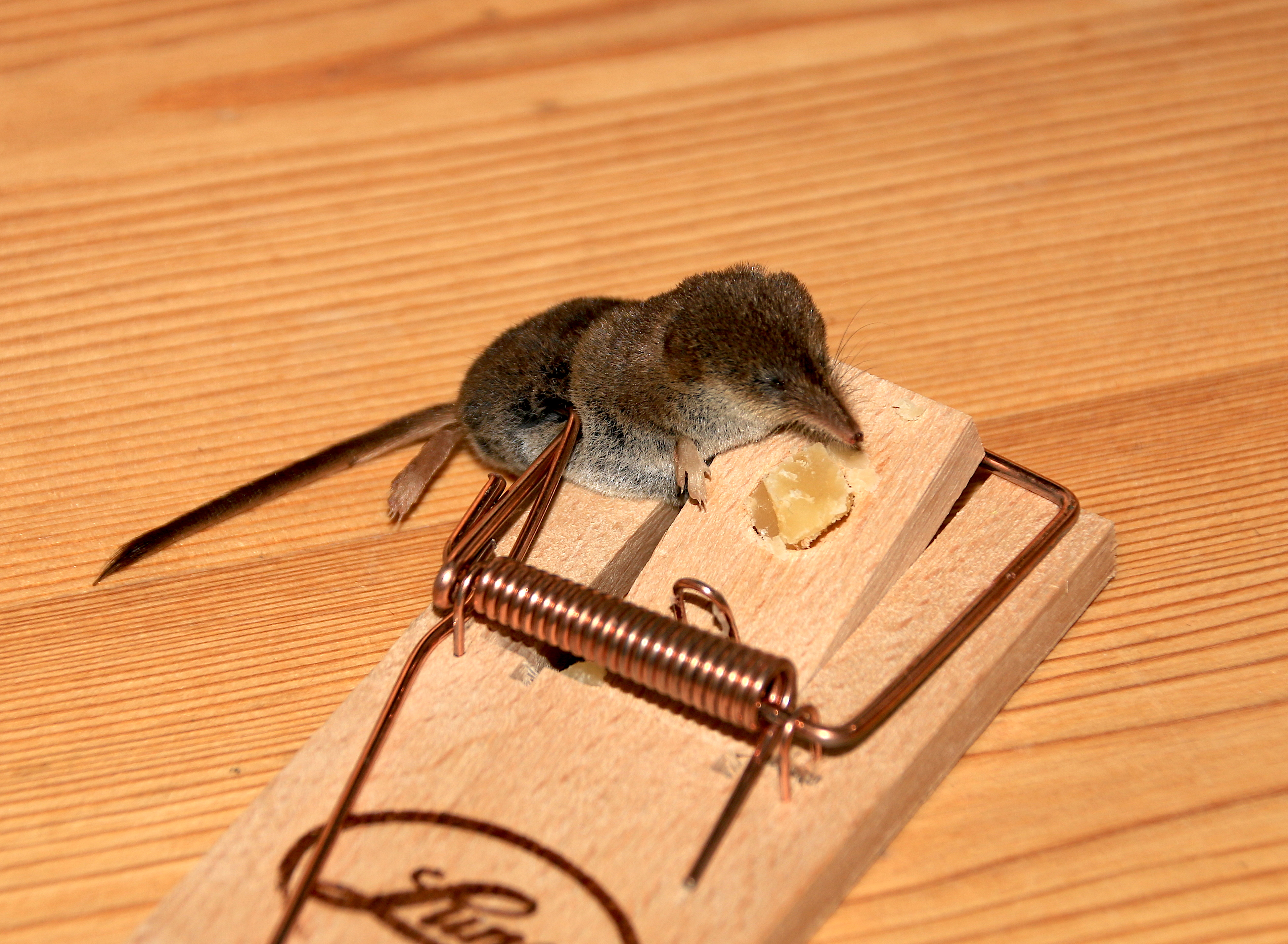 Trapped Shrew (2019)